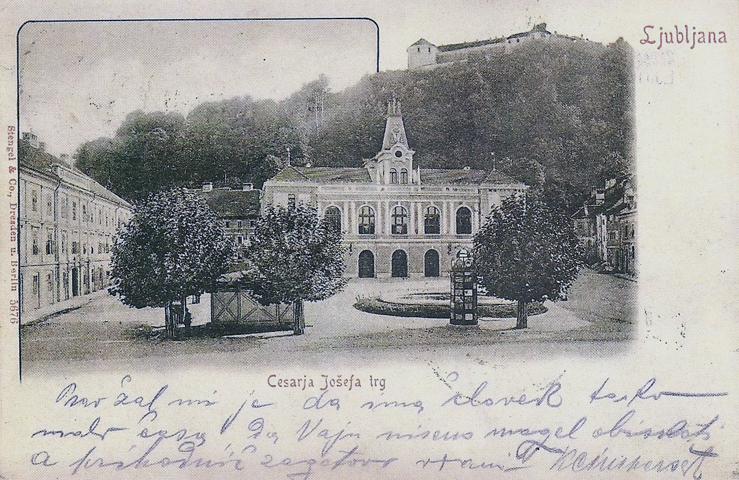 Razglednica Cesarja Jožefa trga v Ljubljani.